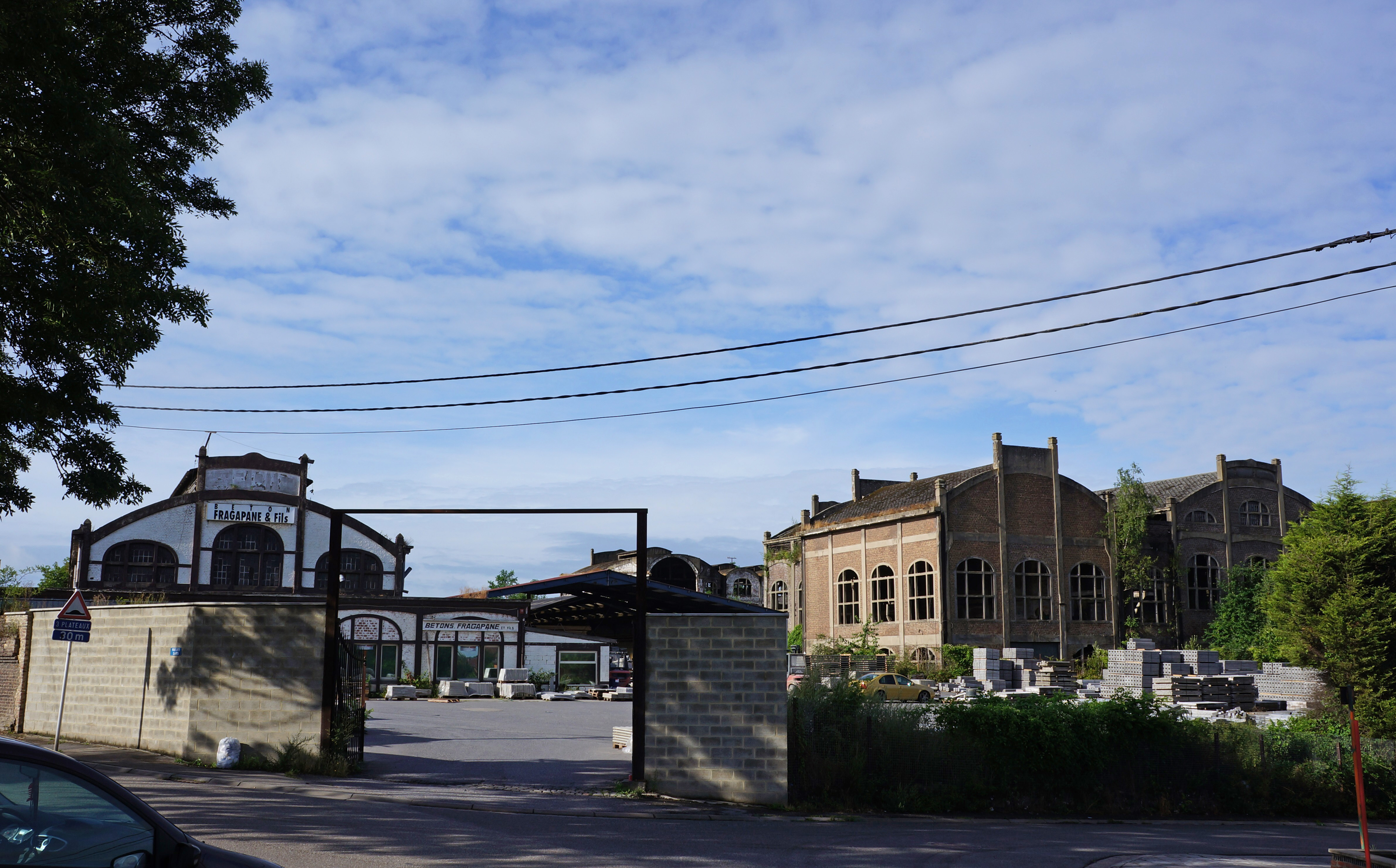 Charbonnage du Gouffre: vue générale.